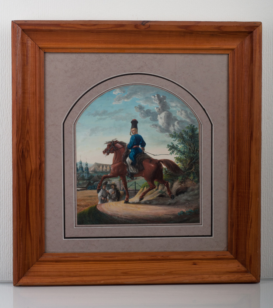 Автор: украинский художник XIX века Проспер Горский. Акварель. 1850 г. Размеры: 27 х 31